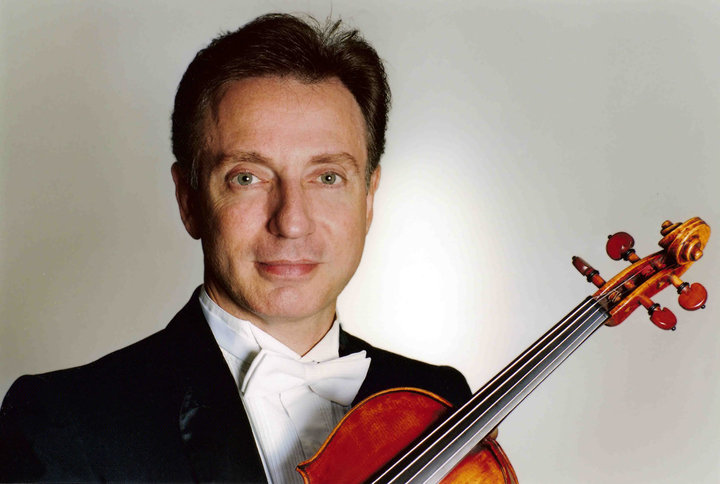 Bernardo Bessler